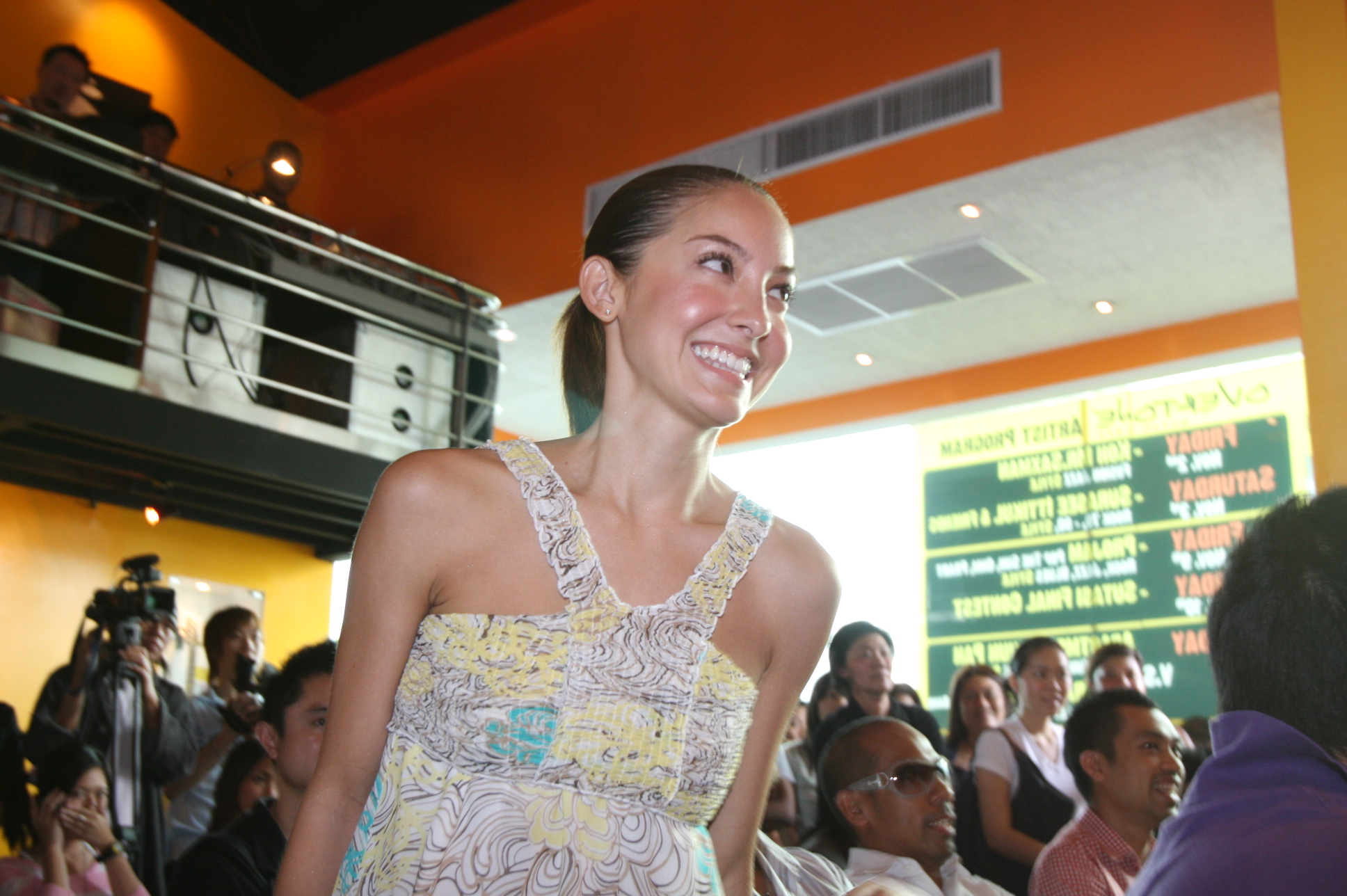 Ase Wang